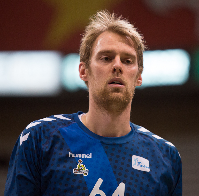 Henk Norel, jugador del San Sebastián Gipuzkoa Basket Club, en un partido de la temporada 2017-18